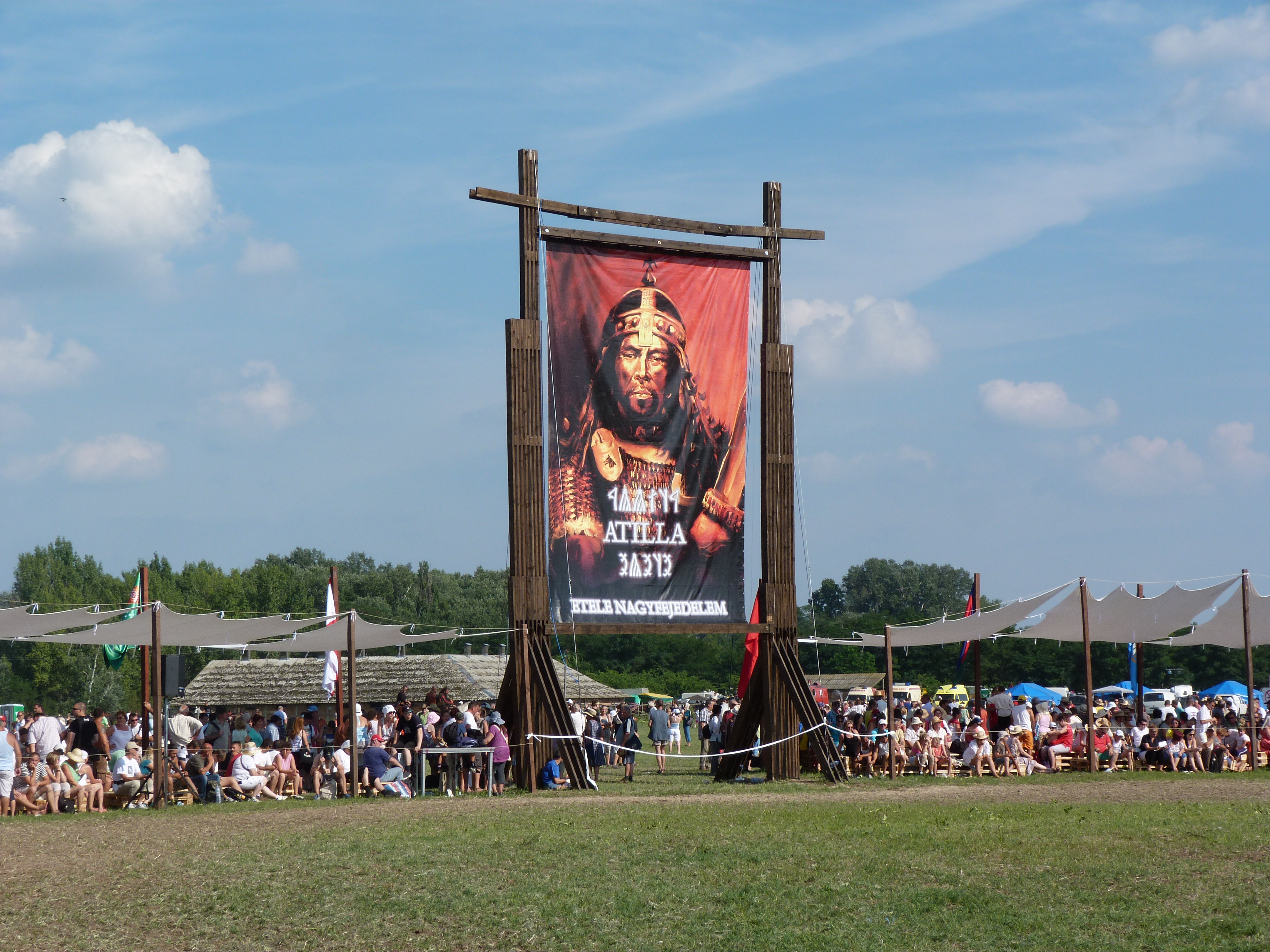 A felvétel 2014. augusztus 9-én, szombaton készült Bugacon. Kurultáj, magyar törzsi gyűlés. ©© Derzsi Elekes Andor, Budapest 2014, You are authorised to use this photo under Creative Commons – even for commercial, for profit purposes. The photo must be attributed to Derzsi Elekes Andor. All of the photos and vids in the Metapolisz DVD line are under Creative Commons and can be used even for commercial – for profit – purposes. Recommended Citation Derzsi Elekes Andor: Metapolisz DVD line